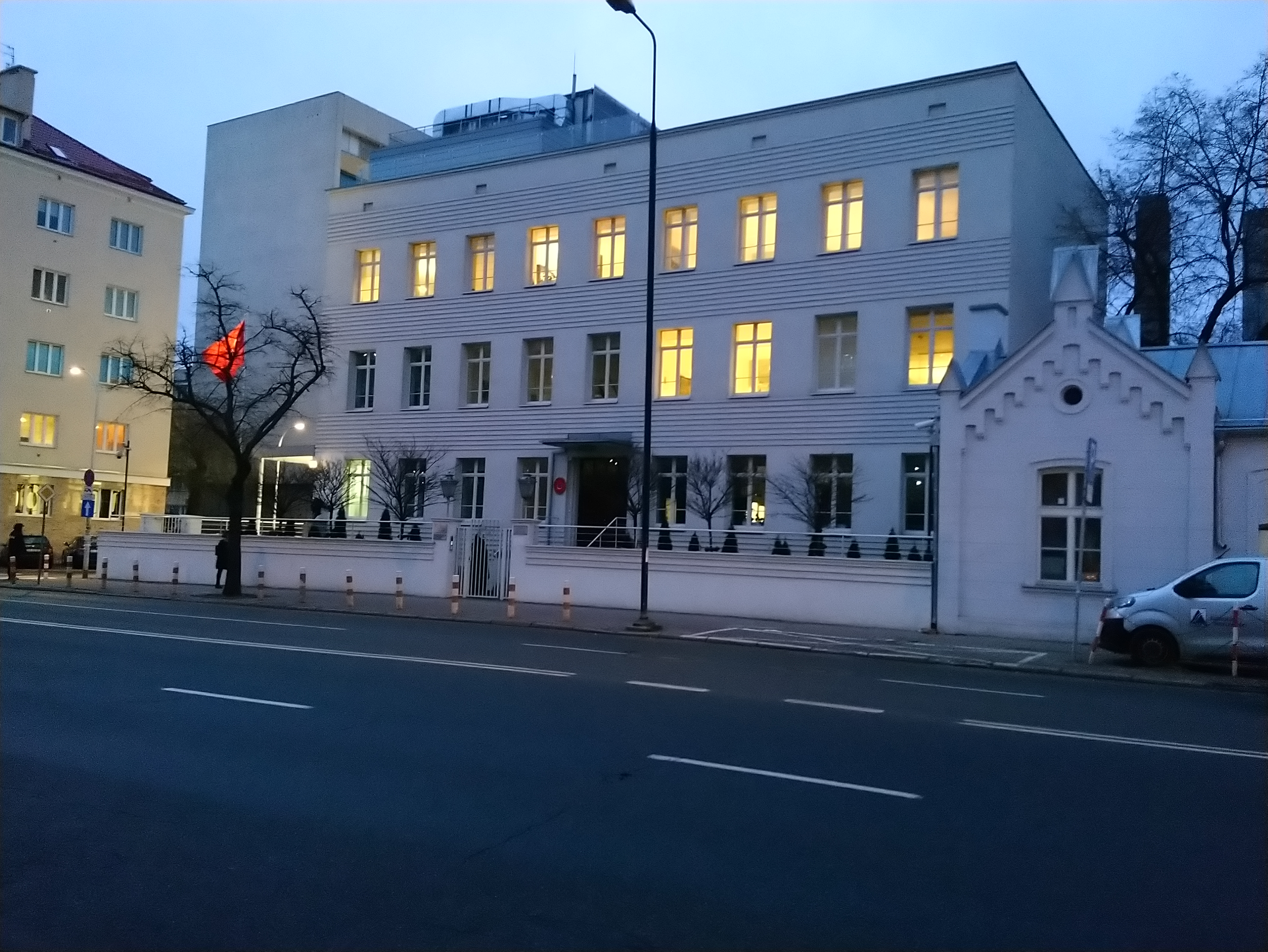 Ambasada Turcji